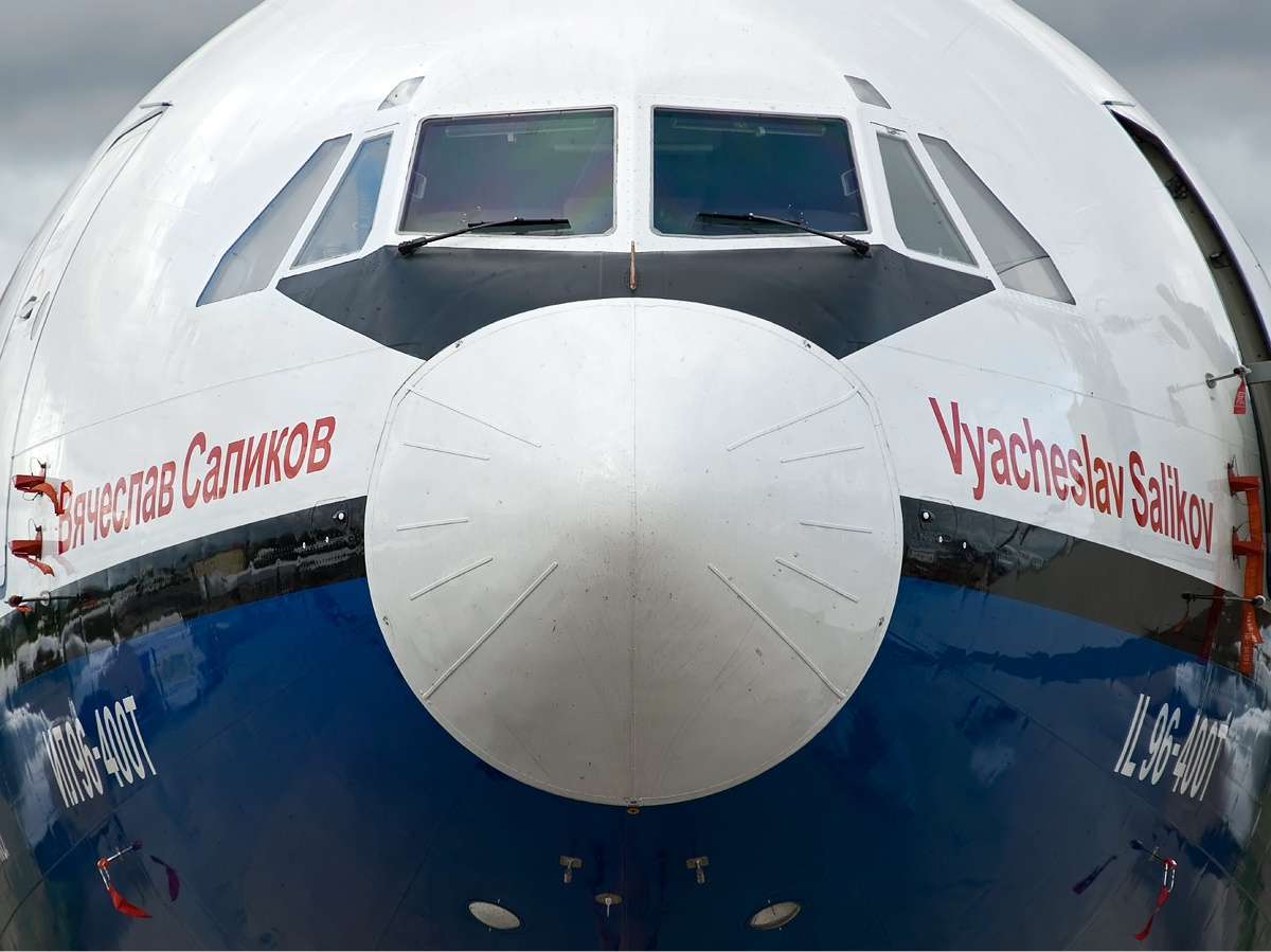 Polet Ilyushin Il-96-400T